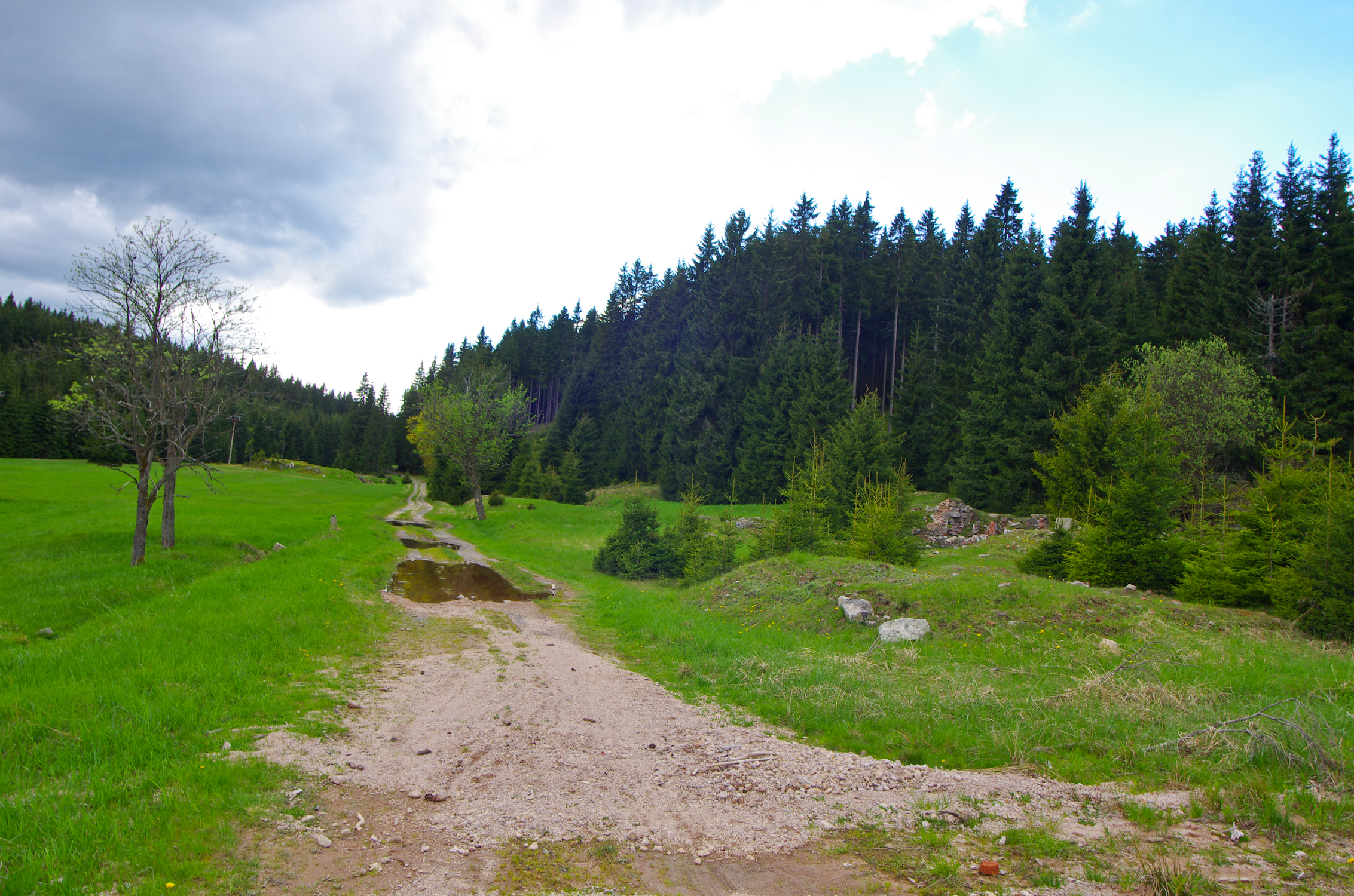 Krušné hory bývalá obec Chaloupky, napravo zbytky starého mlýna, cesta směrem na Přebuz